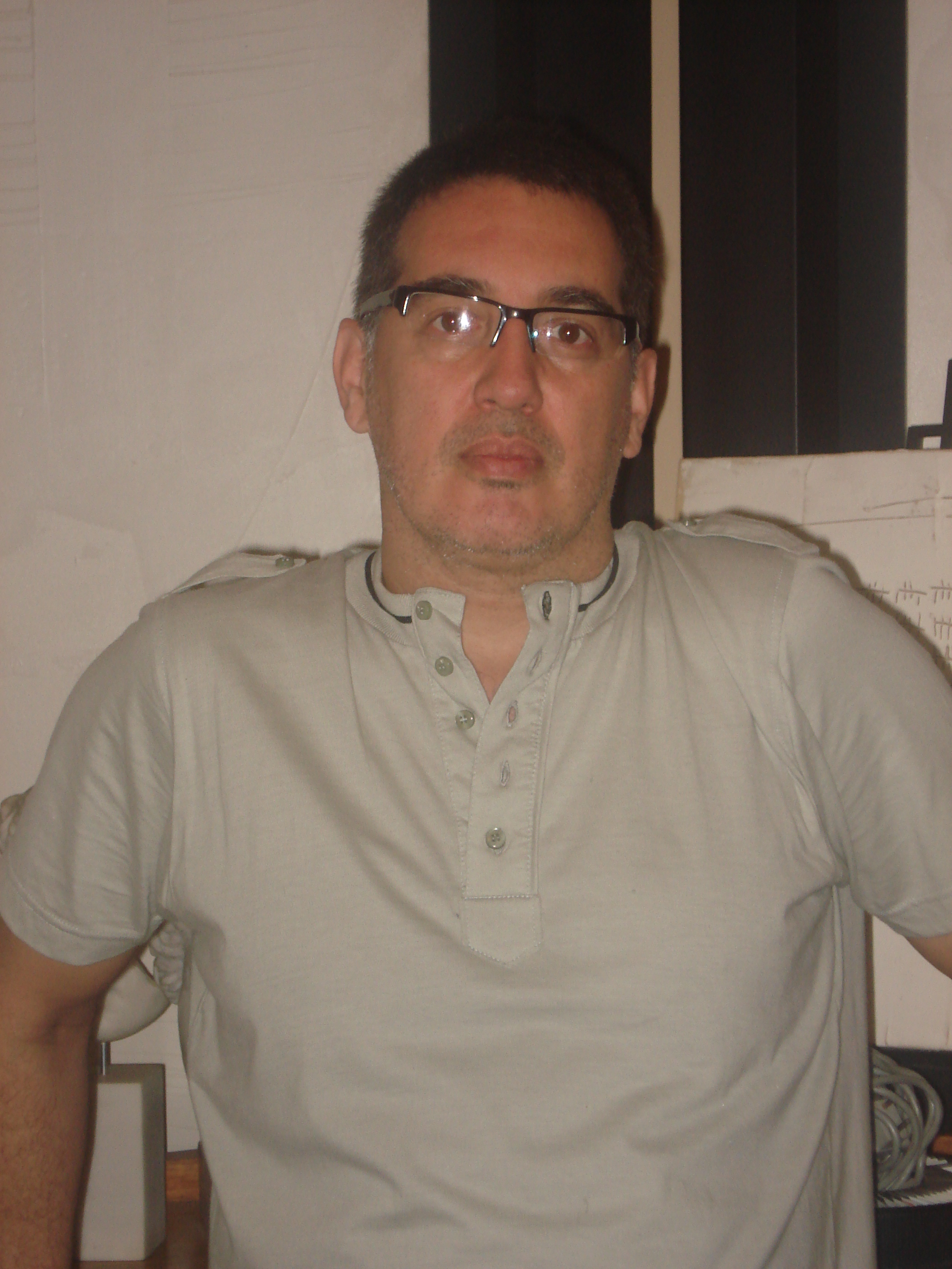 Félix Toranzos